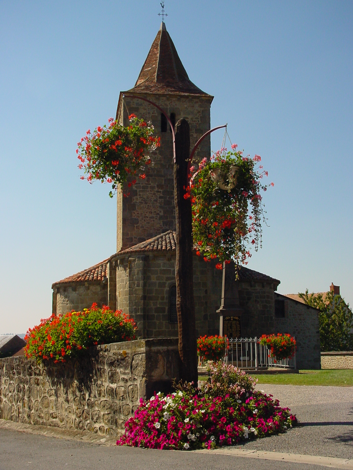 La place Saint Julien, l'église et des suspensions fleuries